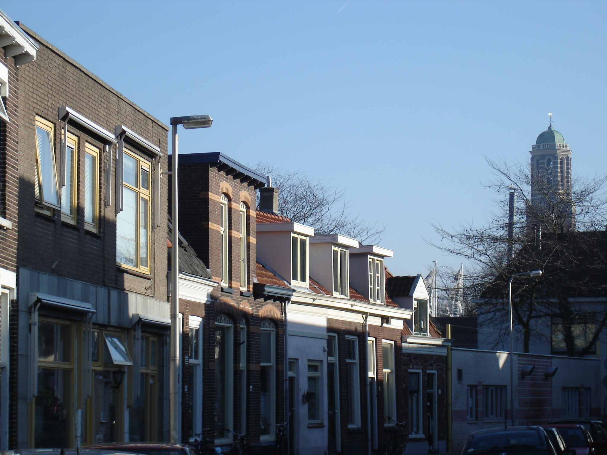 De Hoogstraat in de Kamperpoort te Zwolle met op de achergrond de Peperbus.